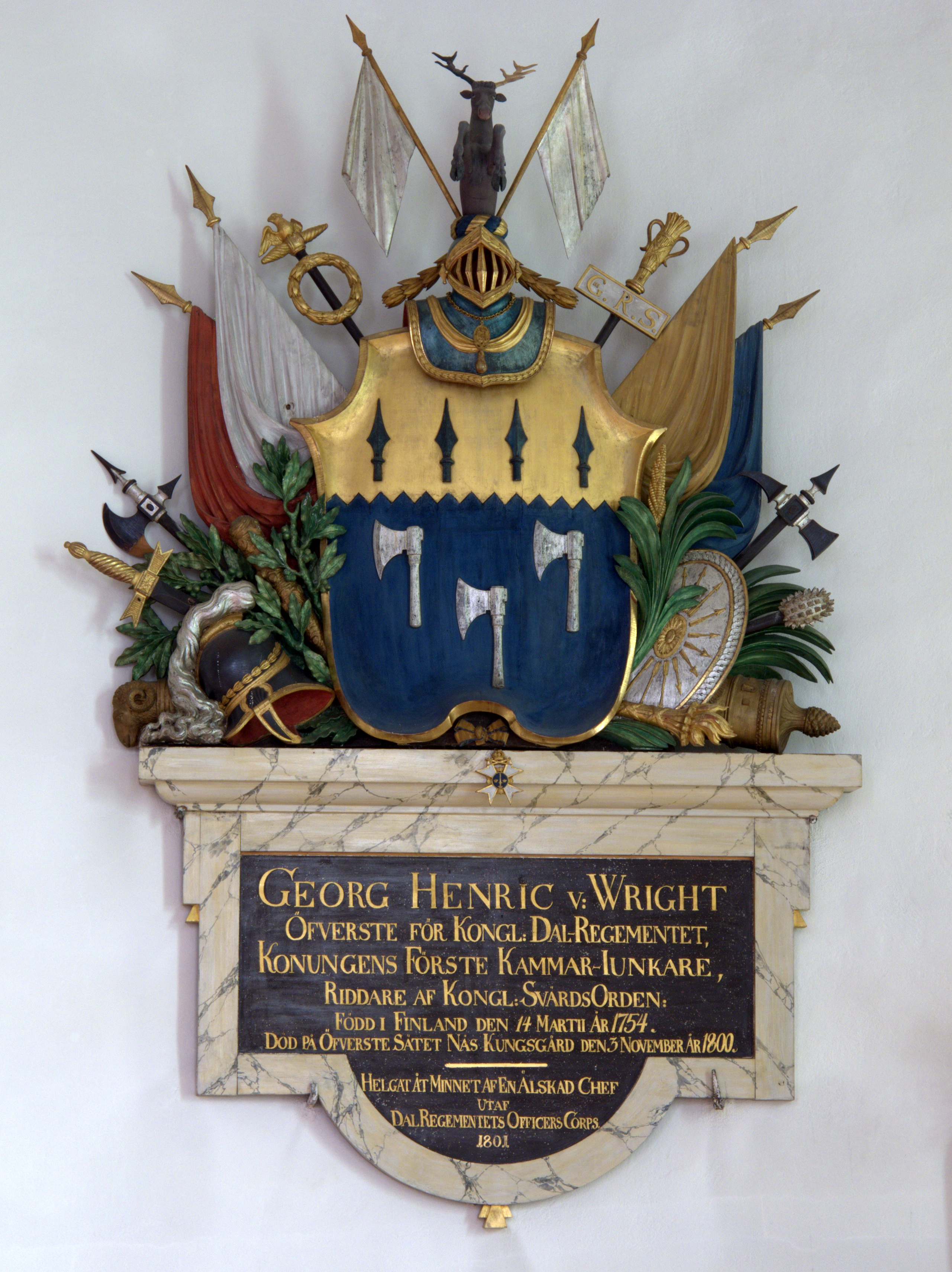 Epitafium för Georg Henrik von Wright i Husby kyrka i Dalarna.